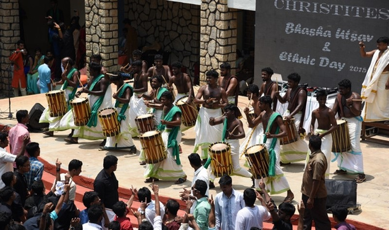 ಕನ್ನಡ: ಭಾಷಾ ಉತ್ಸವ